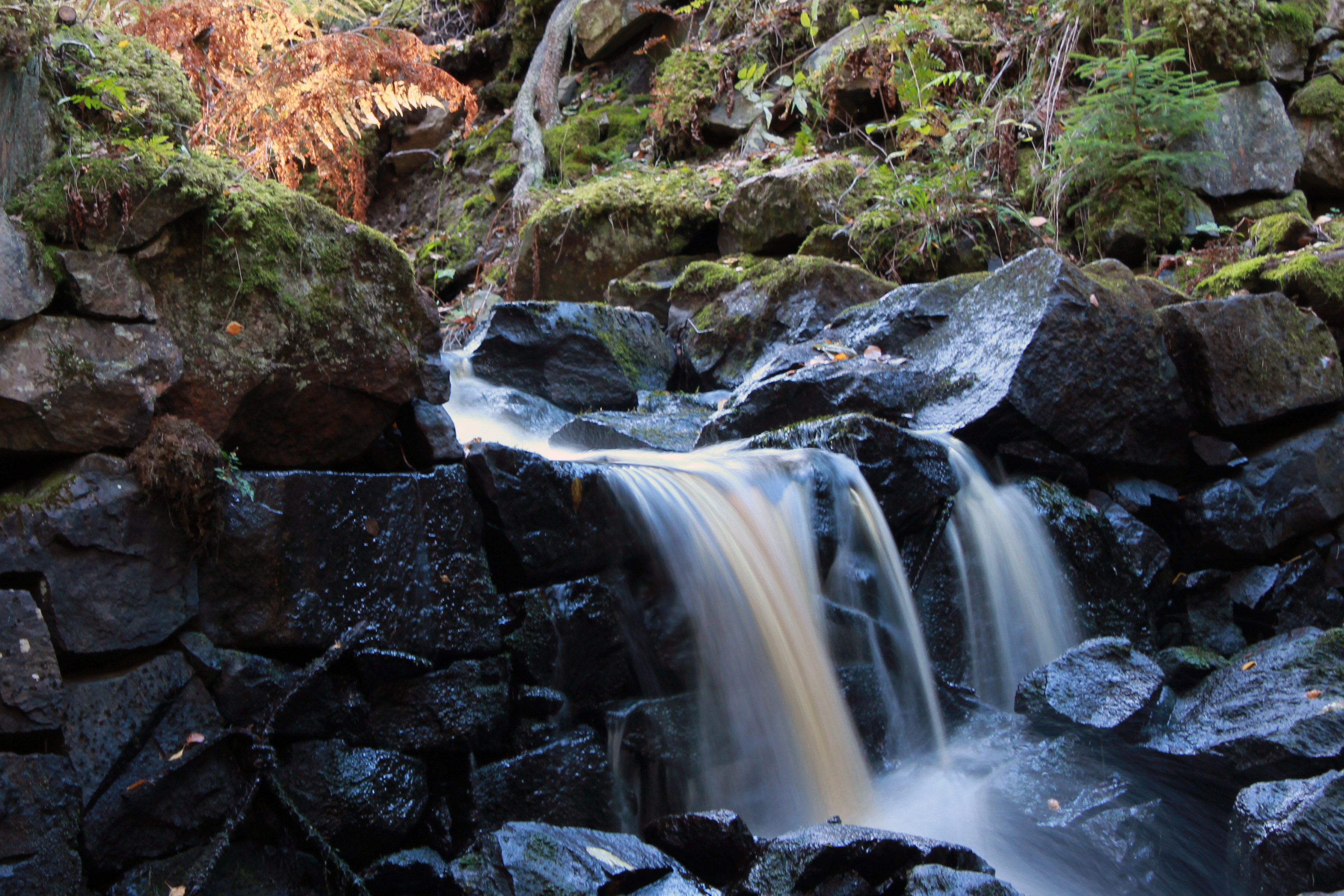 Part of old brass foundry "Bjurfors bruk", Västmanland, Sweden.